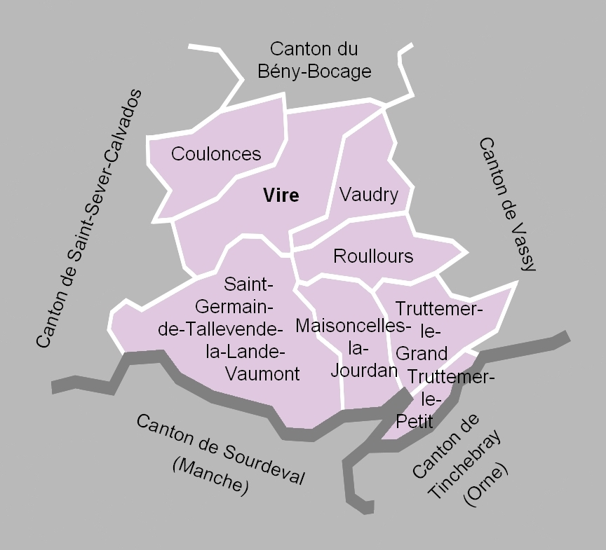 Carte du canton de Vire en 2012.